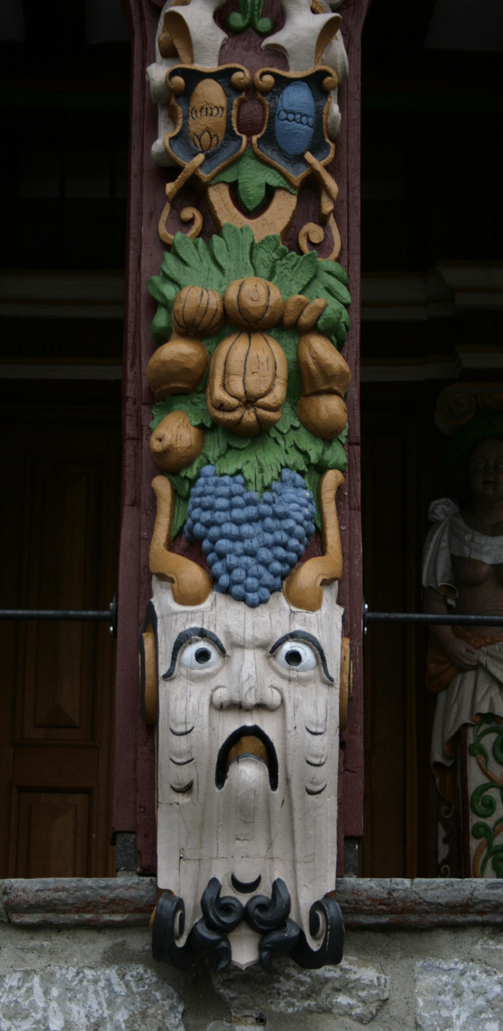 Detail des Schnitzwerks am Portal des Rathauses von Hadamar, Deutschland